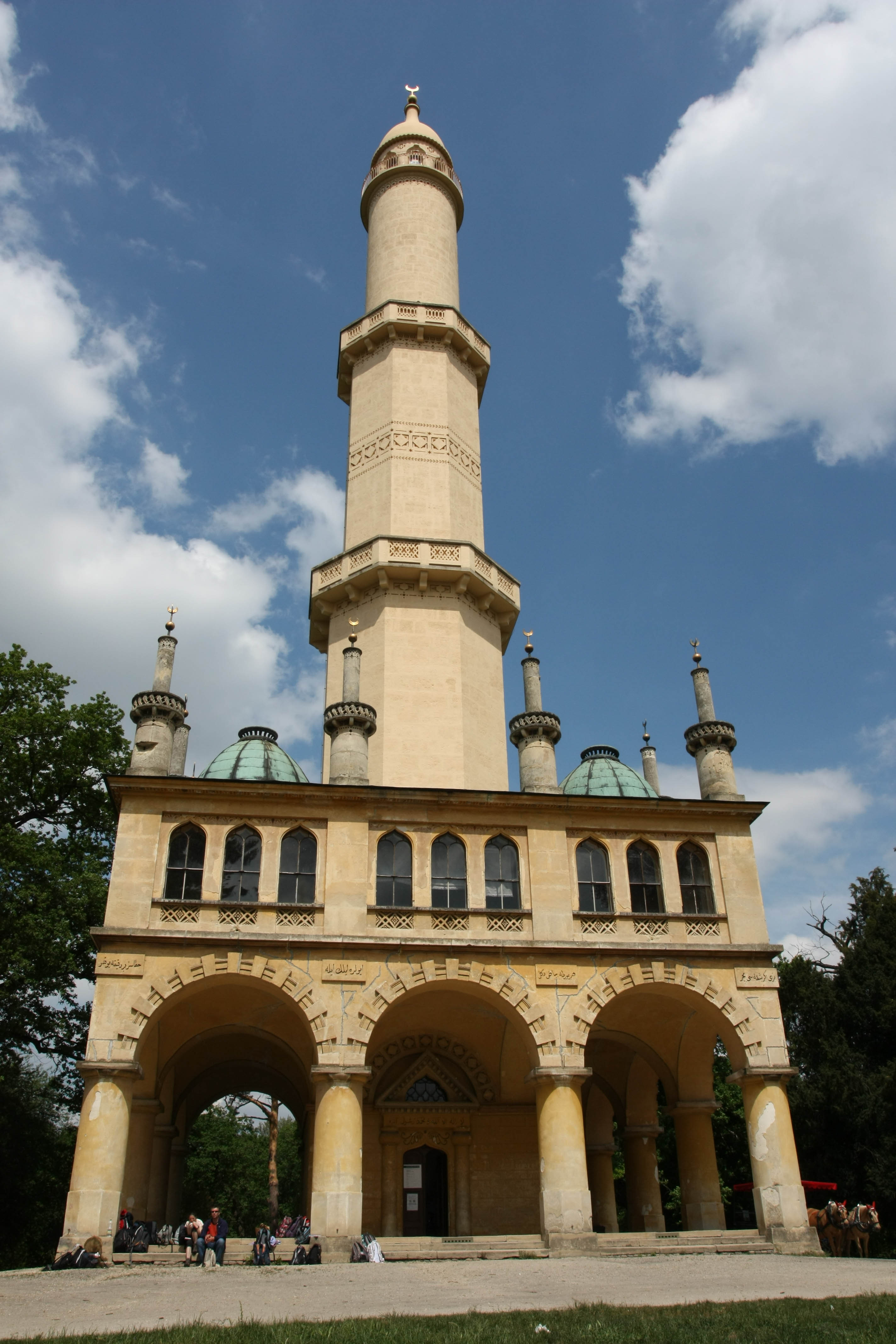 Architektonizované sochař. dílo - minaret (Lednice)